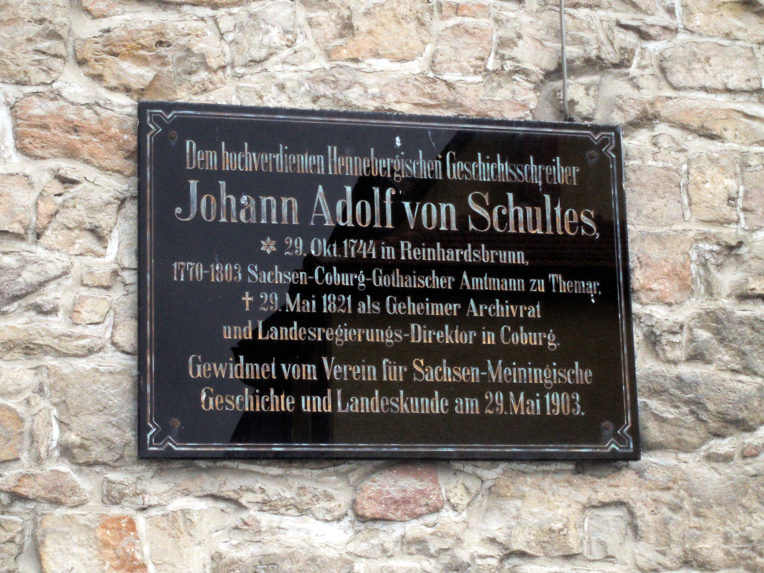 Schultes-Tafel